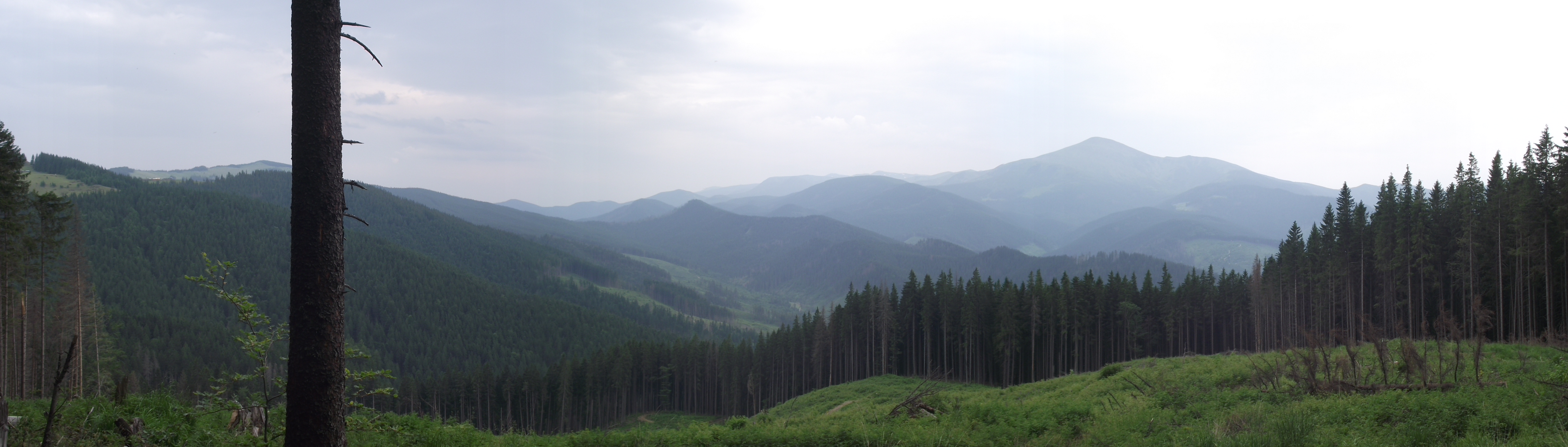 вид на г.Говерлу